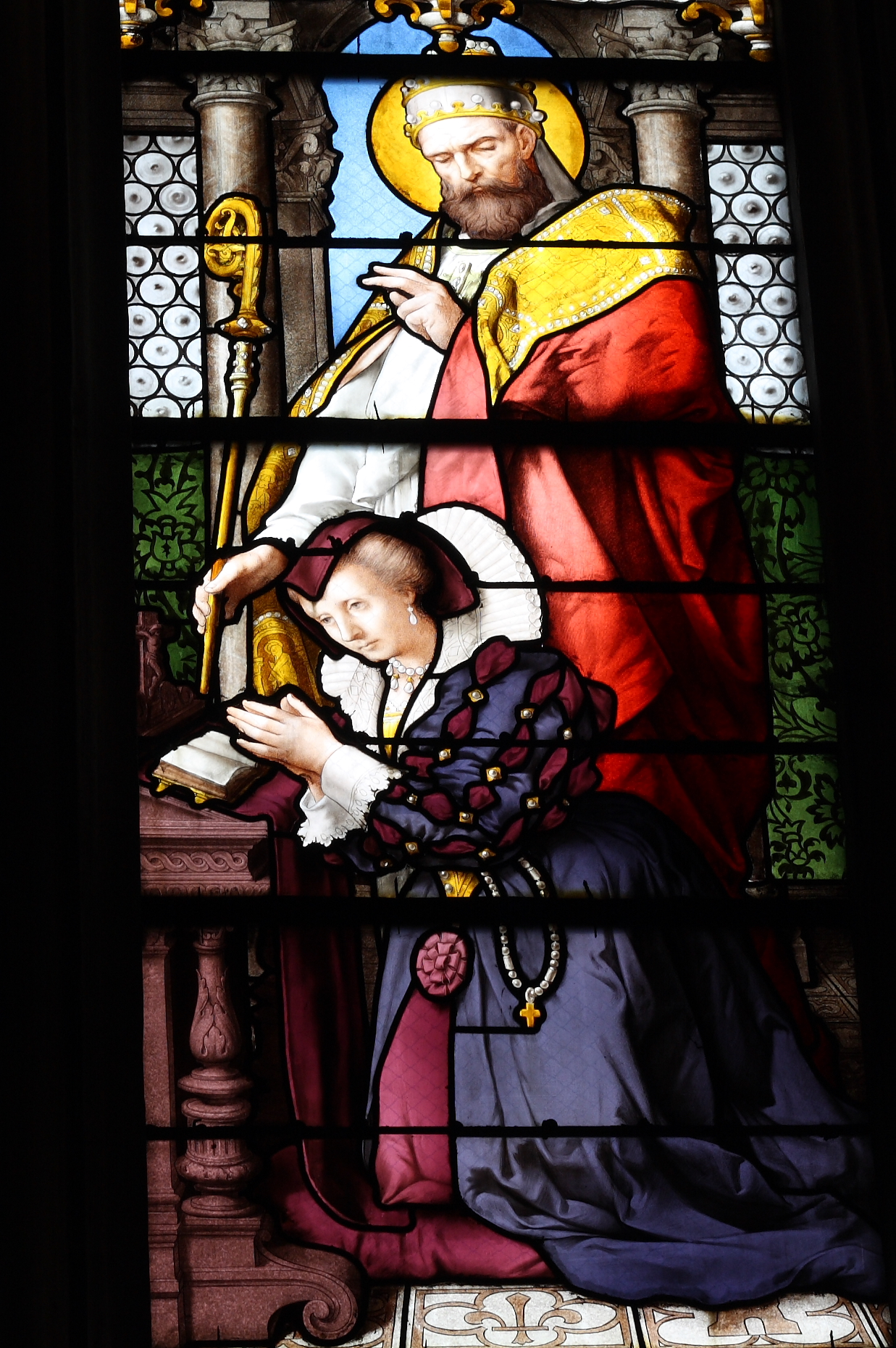 Ausschnitt des Bleiglasfensters Nr. 16 (19. Jahrhundert) in der katholischen Pfarrkirche Saint-Martin (Collégiale Saint-Martin) in Montmorency, Darstellung: Éléonore de Montmorency und der hl. Léon, Karton: Charles Leprévost, Ausführung: François Emile Ehrmann (siehe: Dominique Foussard, Charles Huet, Mathieu Lours: Églises du Val-d'Oise. Pays de France, Vallée de Montmorency, Société d'Histoire et d'Archéologie de Gonesse et du Pays de France, 2. Auflage, Gonesse 2011, ISBN 9782953155426)